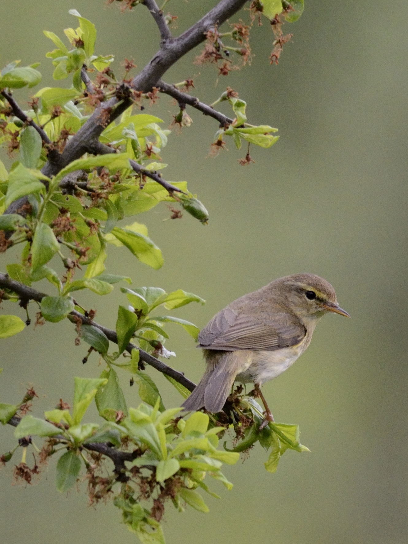 Chiffchaff Phylloscopus collybita, Réserve Naturelle de la Petite Camargue Alsacienne, Alsace, France